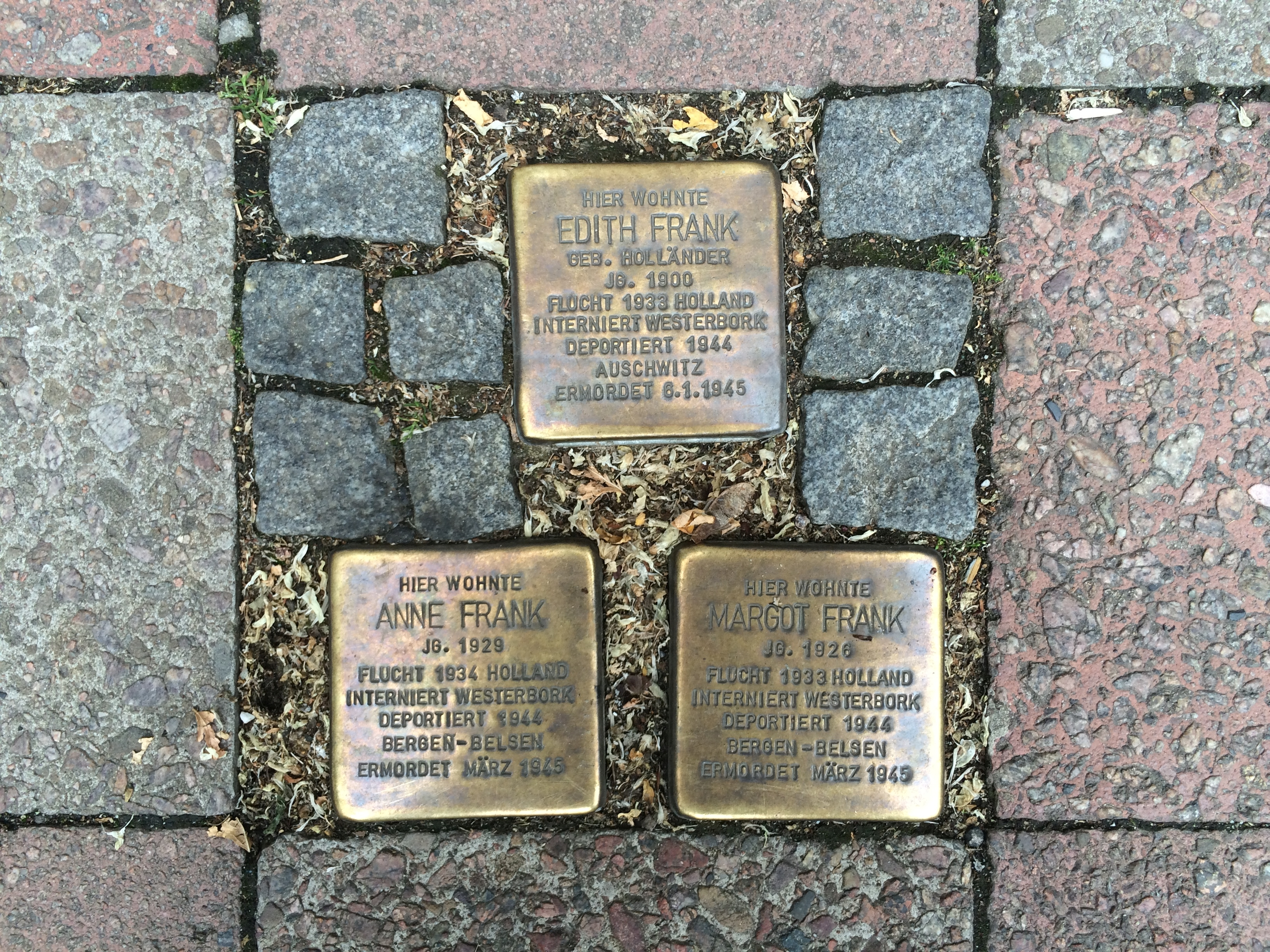 Stolpersteine zum Gedenken an die Familie Frank (Edith, Anne, Margot) in Aachen